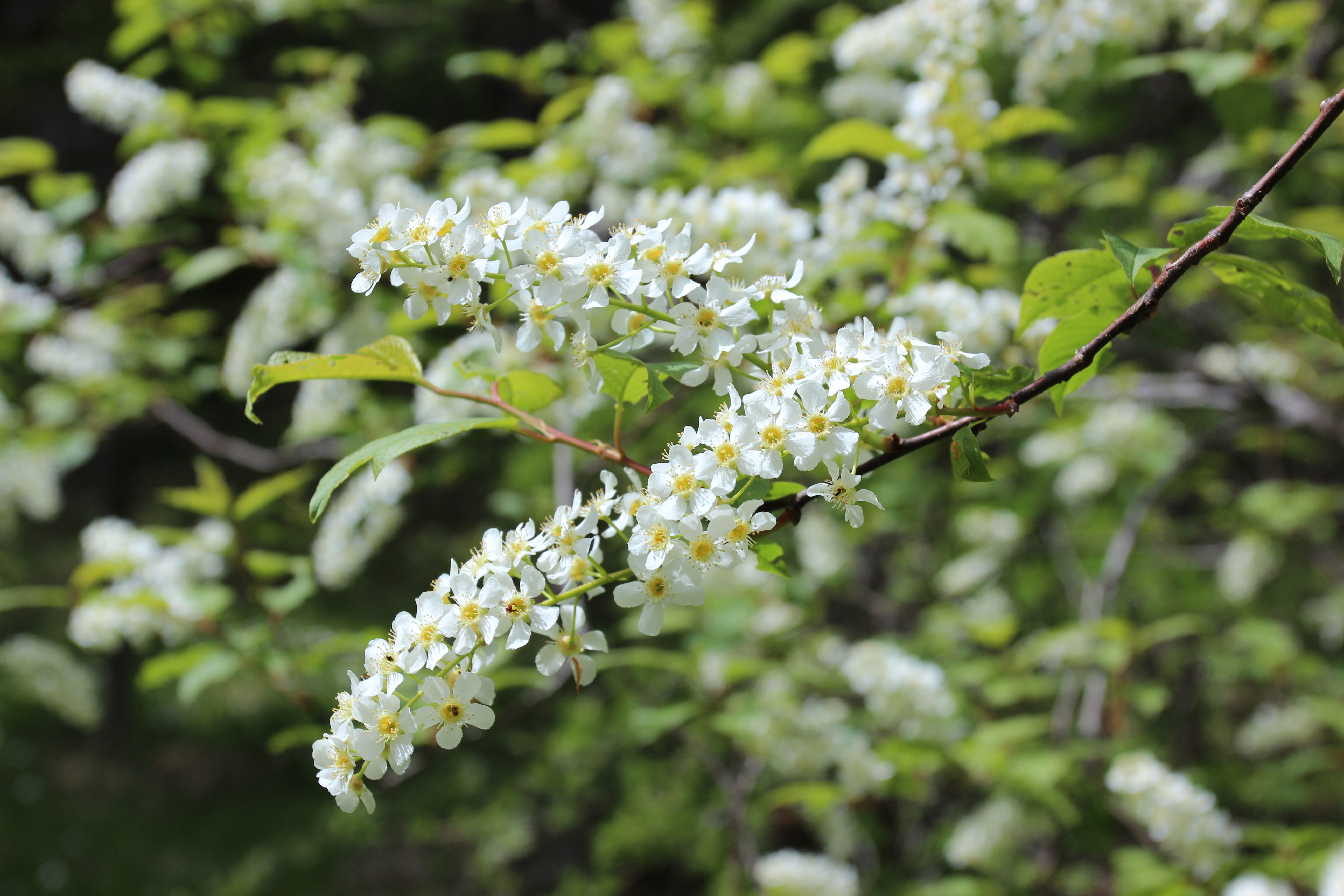 Gewöhnliche Traubenkirsche (Prunus padus)